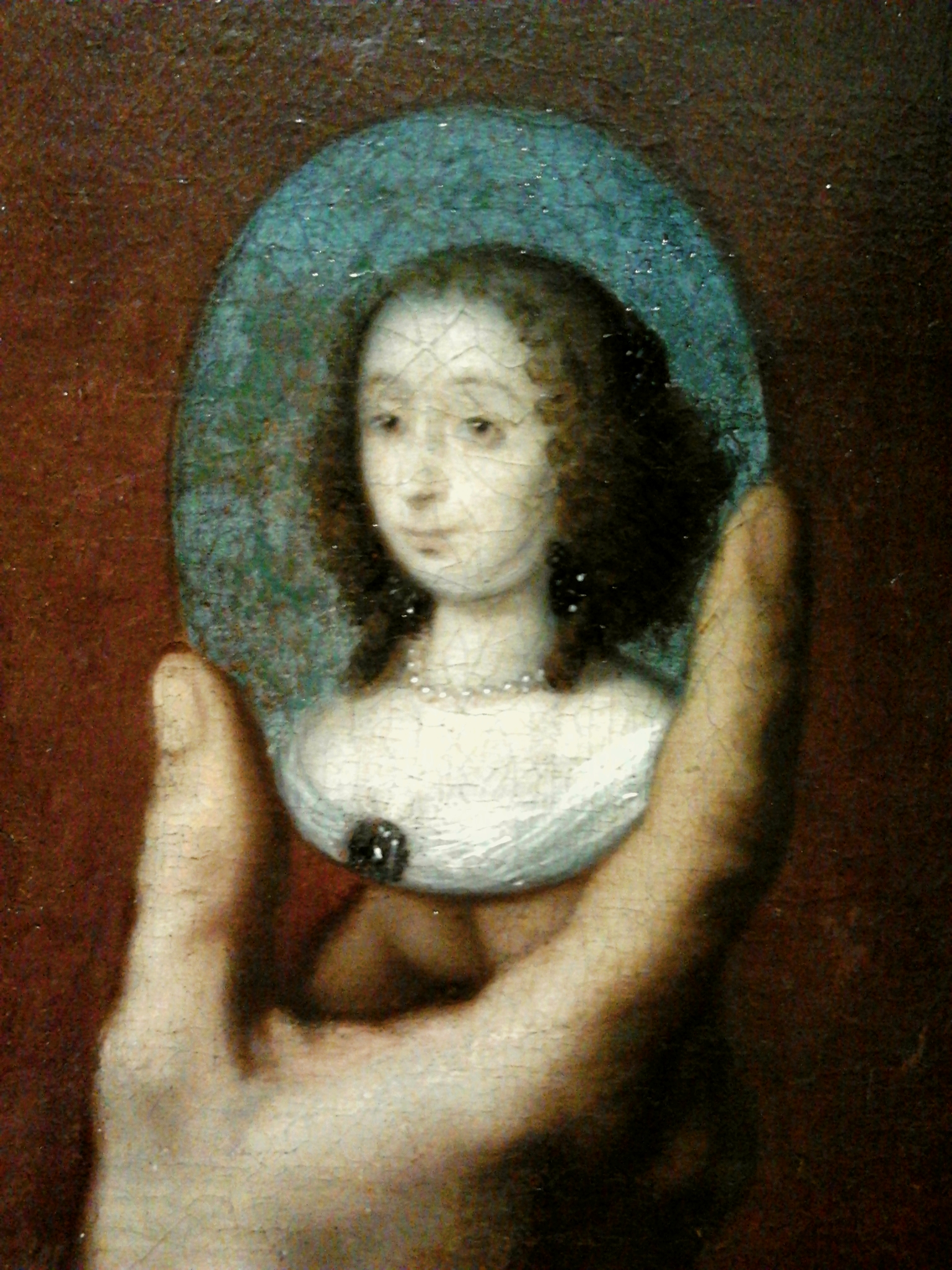 detail